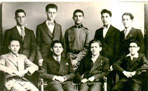 קבוצת חברים מתא השומר הצעיר בסרייבו כפי שצולמו ב-1933